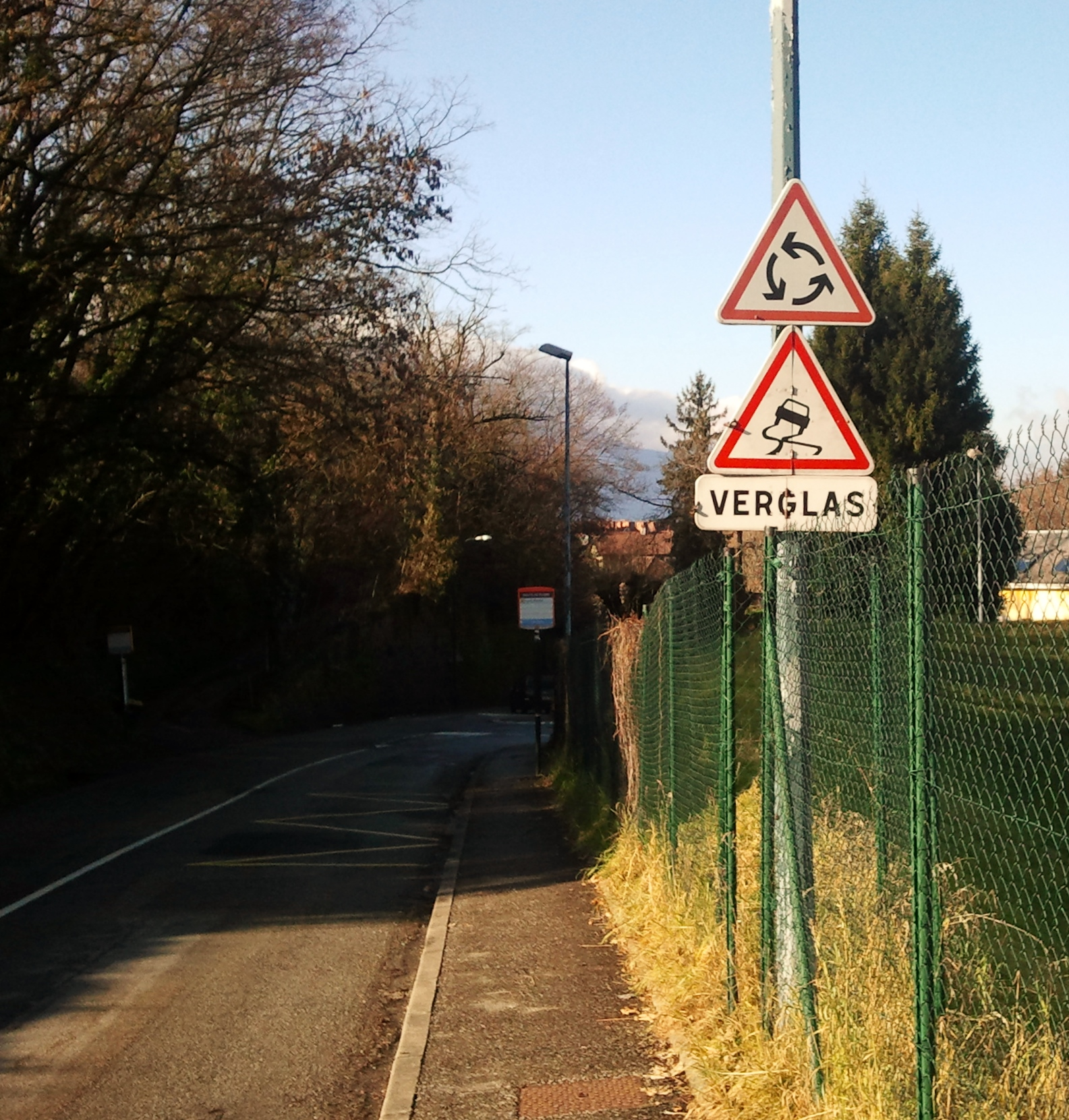 Panneaux de signalisation se trouvant sur la route du Revard (D913) à Aix-les-Bains (73).